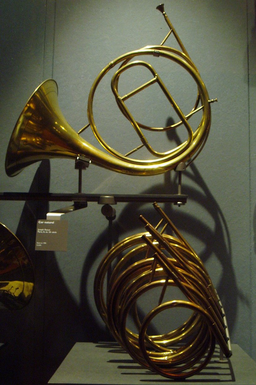 Cor naturel à tons de rechange, et ses différents tons - Joseph Raoux, Paris, fin du XVIII - Paris, musée de la musique